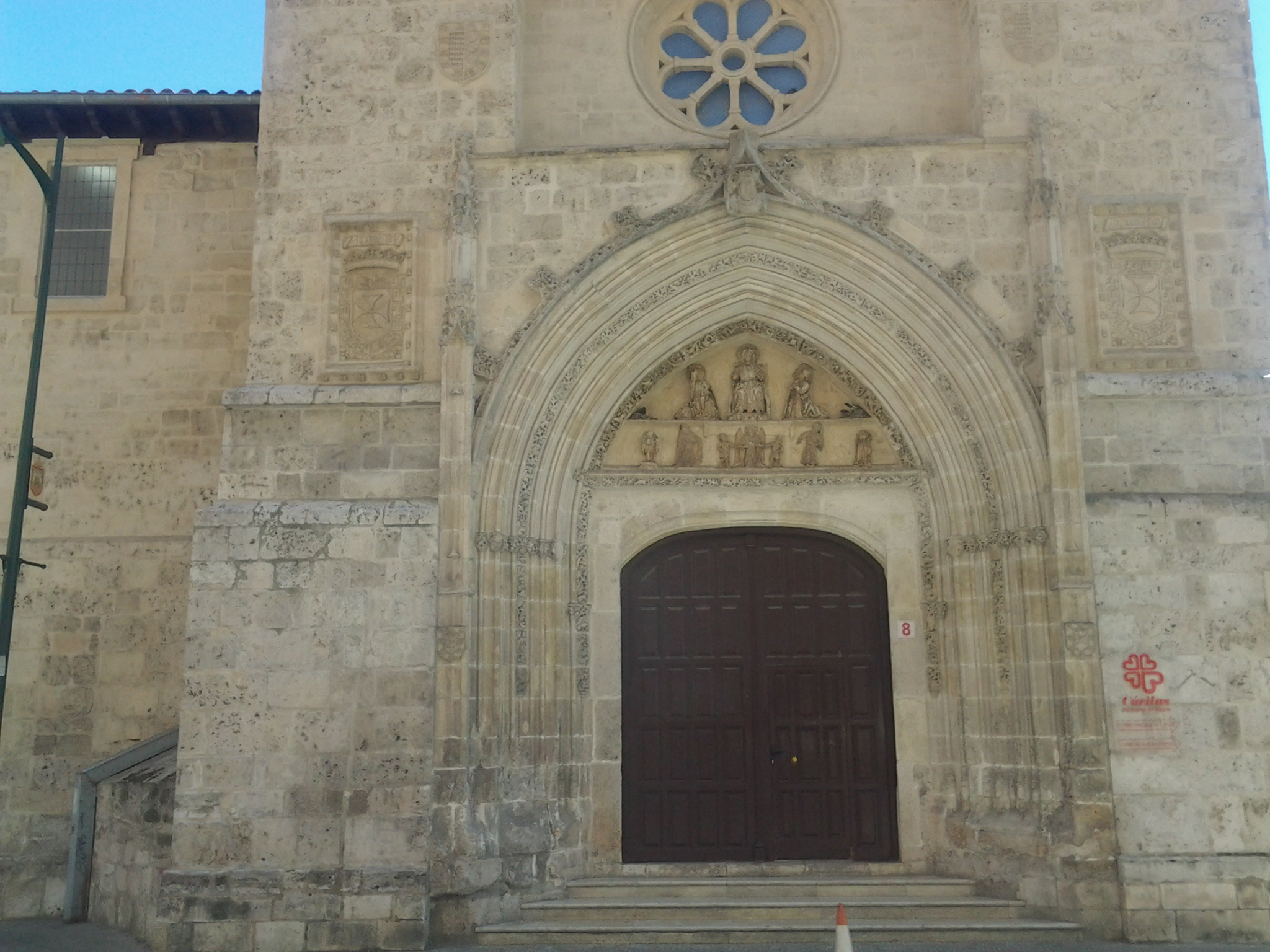 Portada de la capilla de San Ildefonso del desaparecido convento de la Stma. Trinidad de Burgos. En la actualidad alberga las sedes de Cáritas Diocesana y Patrimonio Artístico de la ciudad de Burgos. Provincia de Burgos, (España).